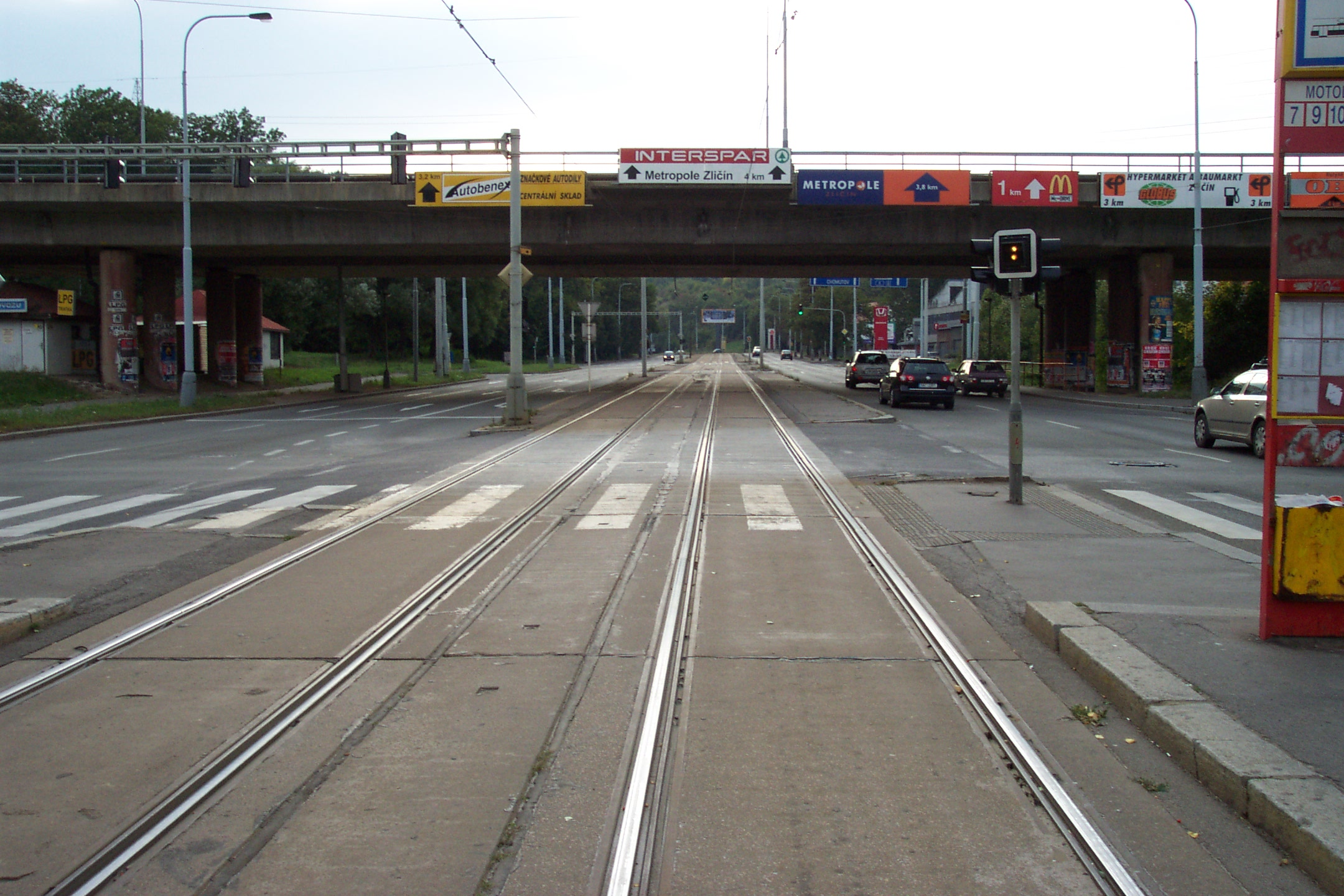 Plzeňská street in Prague - Ulice Plzeňská v Praze